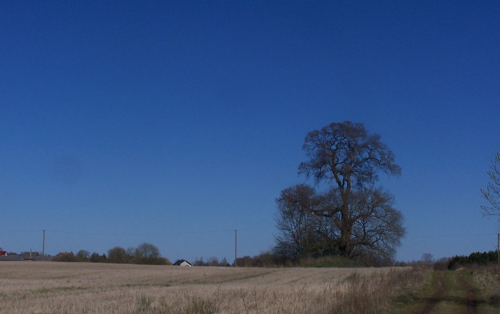 Žvėrių vinkšna